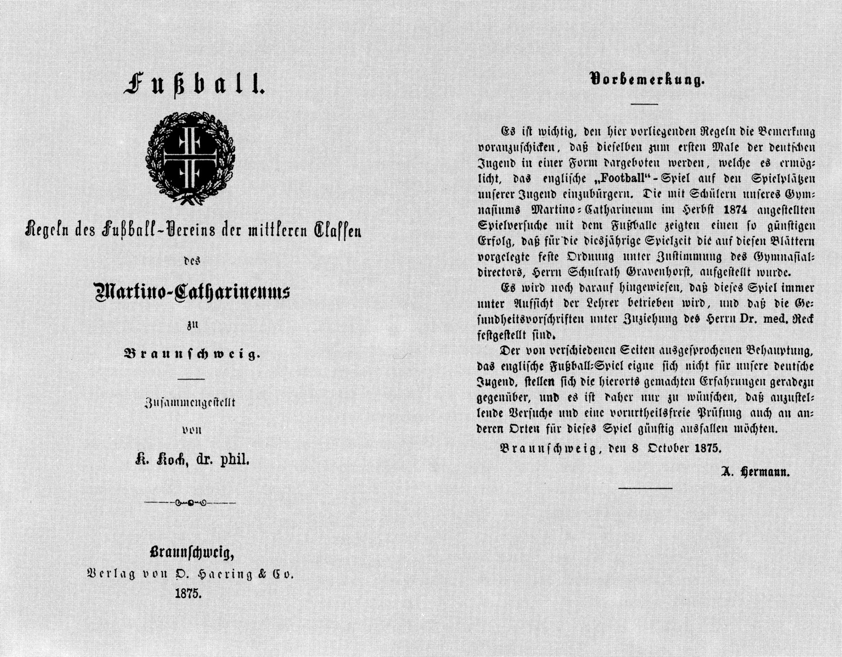 Rechtlicher Hinweis: Die Verwendung der Fotos ist frei für journalistische Zwecke zur Berichterstattung über Braunschweig bei Nennung der Quelle. Bitte schicken Sie ein Belegexemplar an: Braunschweig Stadtmarketing GmbH Schild 4 38100 Braunschweig "Titelseite der ersten deutschen Fußballregeln von 1875 (Archiv Kurt Hoffmeister) Konrad Kochs Regeln für den Schulfußball am Braunschweiger Martino-Katharineum von 1875 waren das erste Regelwerk für den Fußball in deutscher Sprache. Die Abbildung zeigt die Titelseite der 1. Auflage unter dem Titel: Konrad Koch: Fußball. Regeln des Fußball-Vereins der mittlern Classen des Martino-Catharineums zu Braunschweig. Braunschweig 1875."